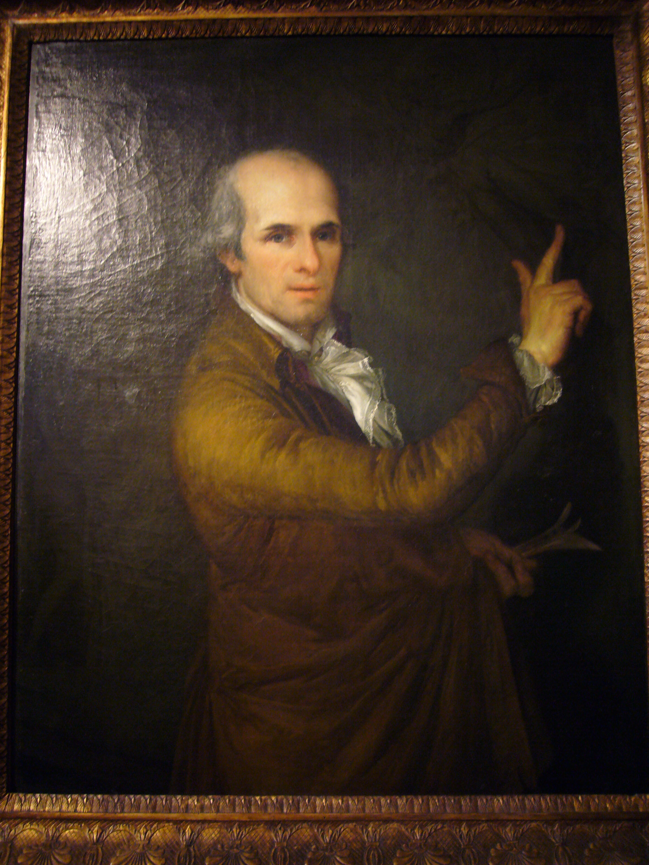 Self-portrait